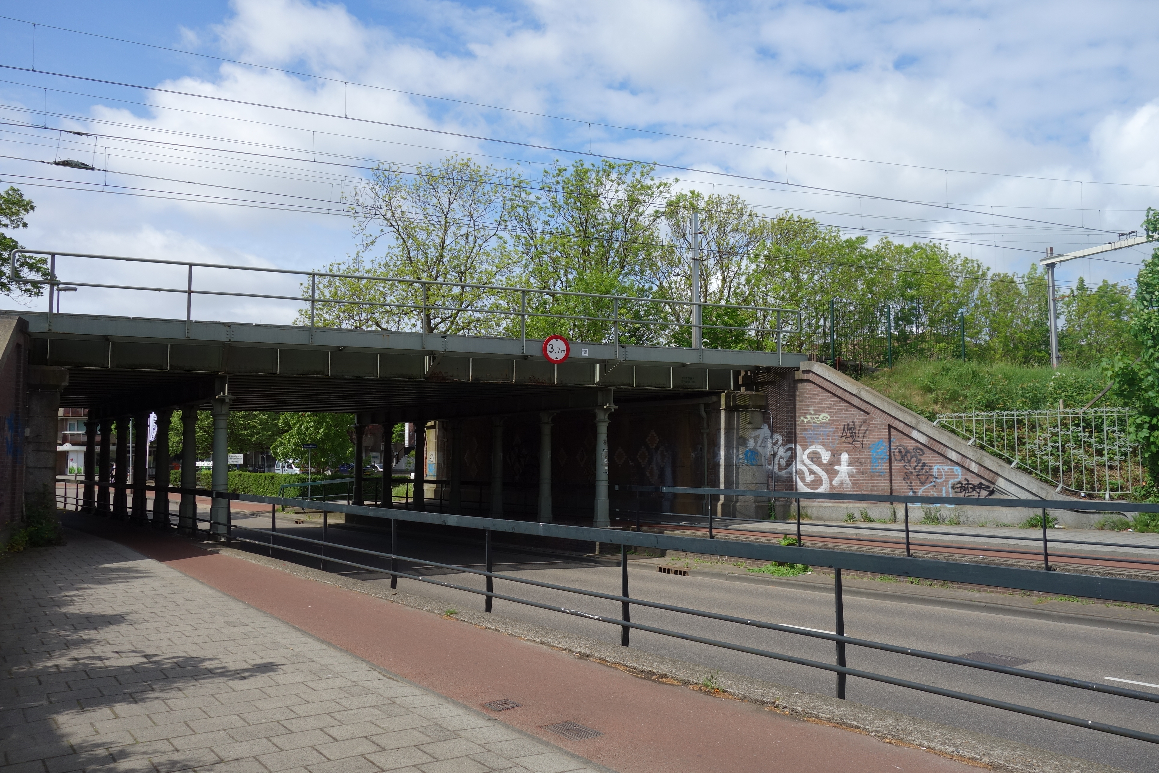 Spoorbrug over de Zijlweg in Haarlem. De brug is gemeentelijk monument en heeft gietijzeren pilaren in twee rijen. De hekken die het talud van de weg afsluiten zijn voorzien van het logo van de NS, dit logo is opgemaakt uit kleinere logo's.